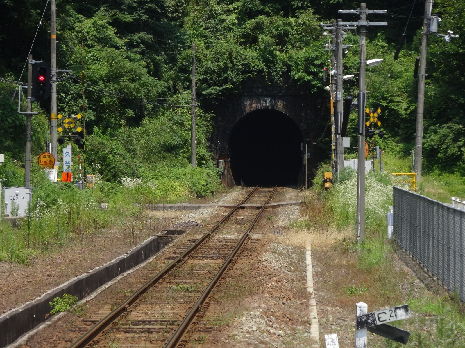 桃観トンネル（久谷駅より撮影）